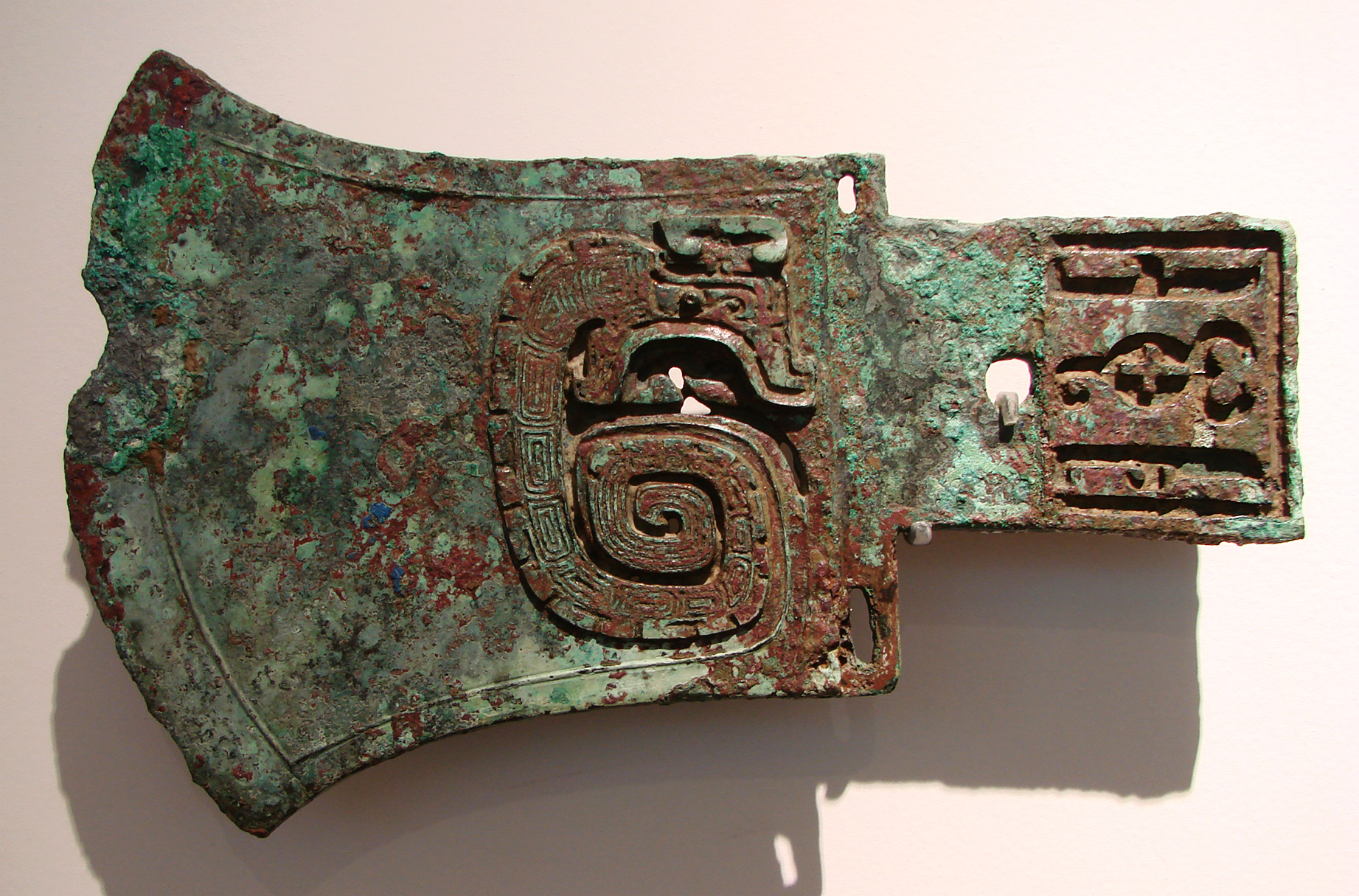 Hache Yue en bronze. Chine du Nord, dynastie Shang, 13ème - 11ème siècle -JC. Musée Guimet, Paris.